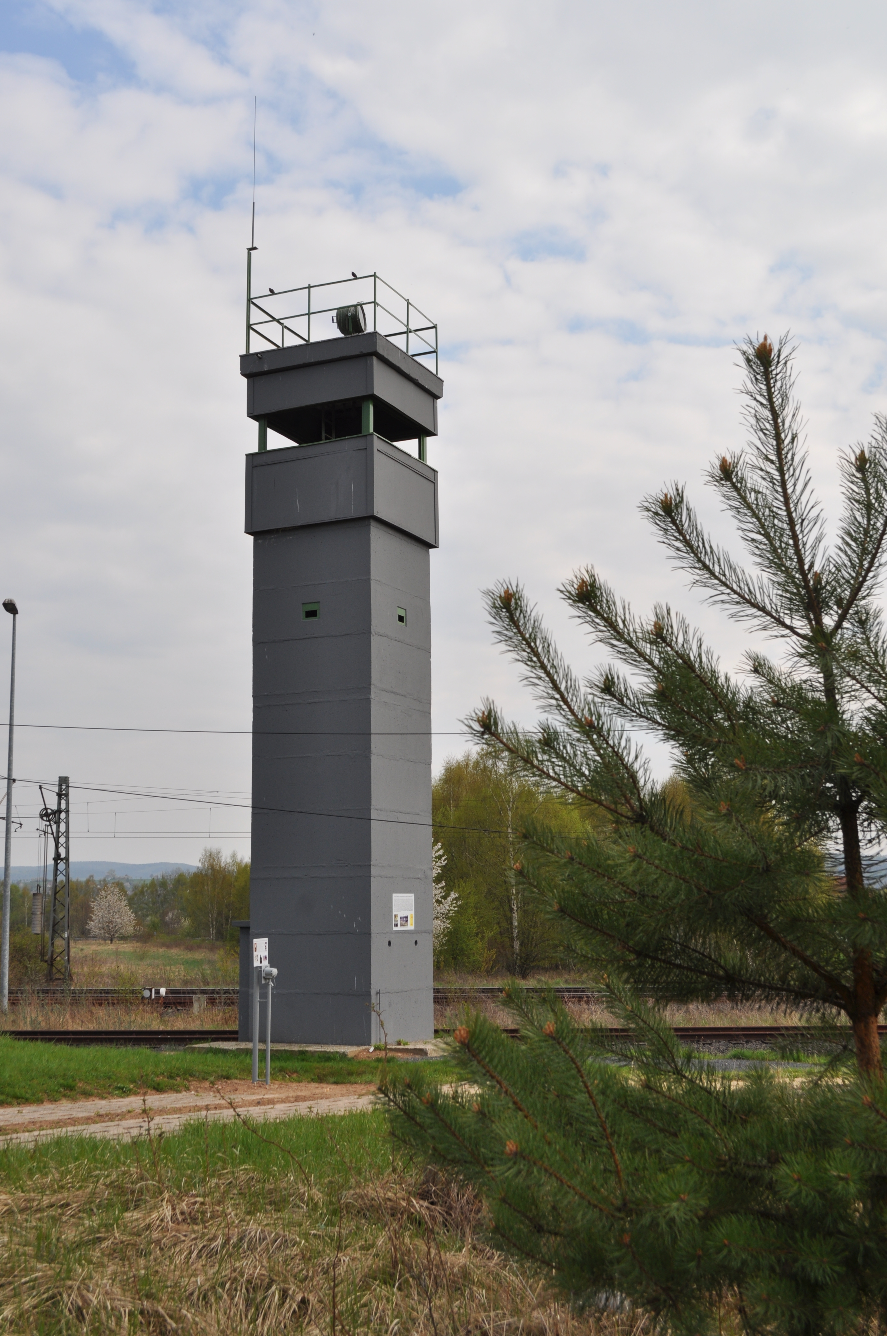 DDR-Beobachtungsturm gegenüber von Obersuhl